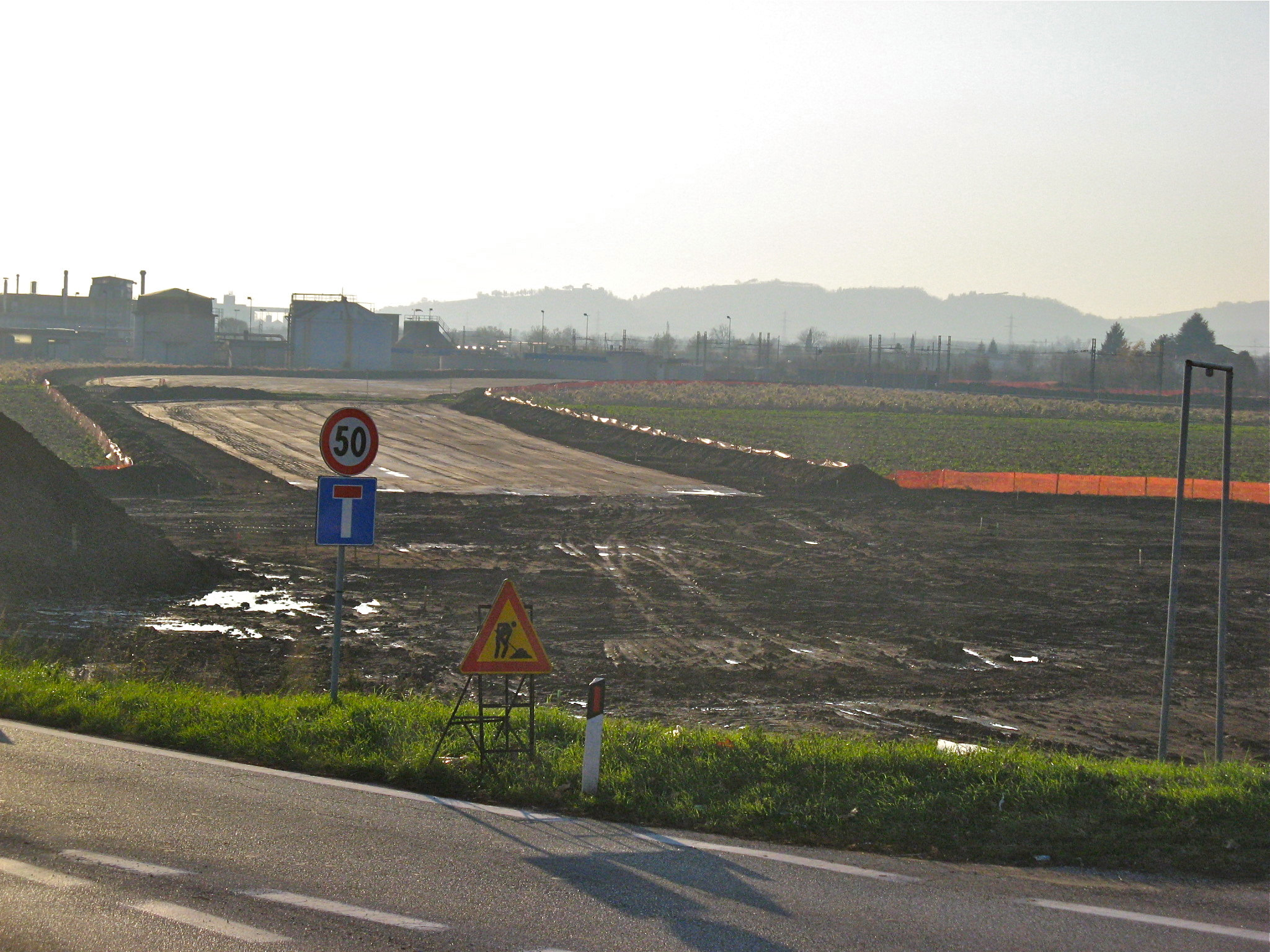 Inizio in costruzione della Pedemontana Veneta, presso il casello autostradale di Montecchio (A4).